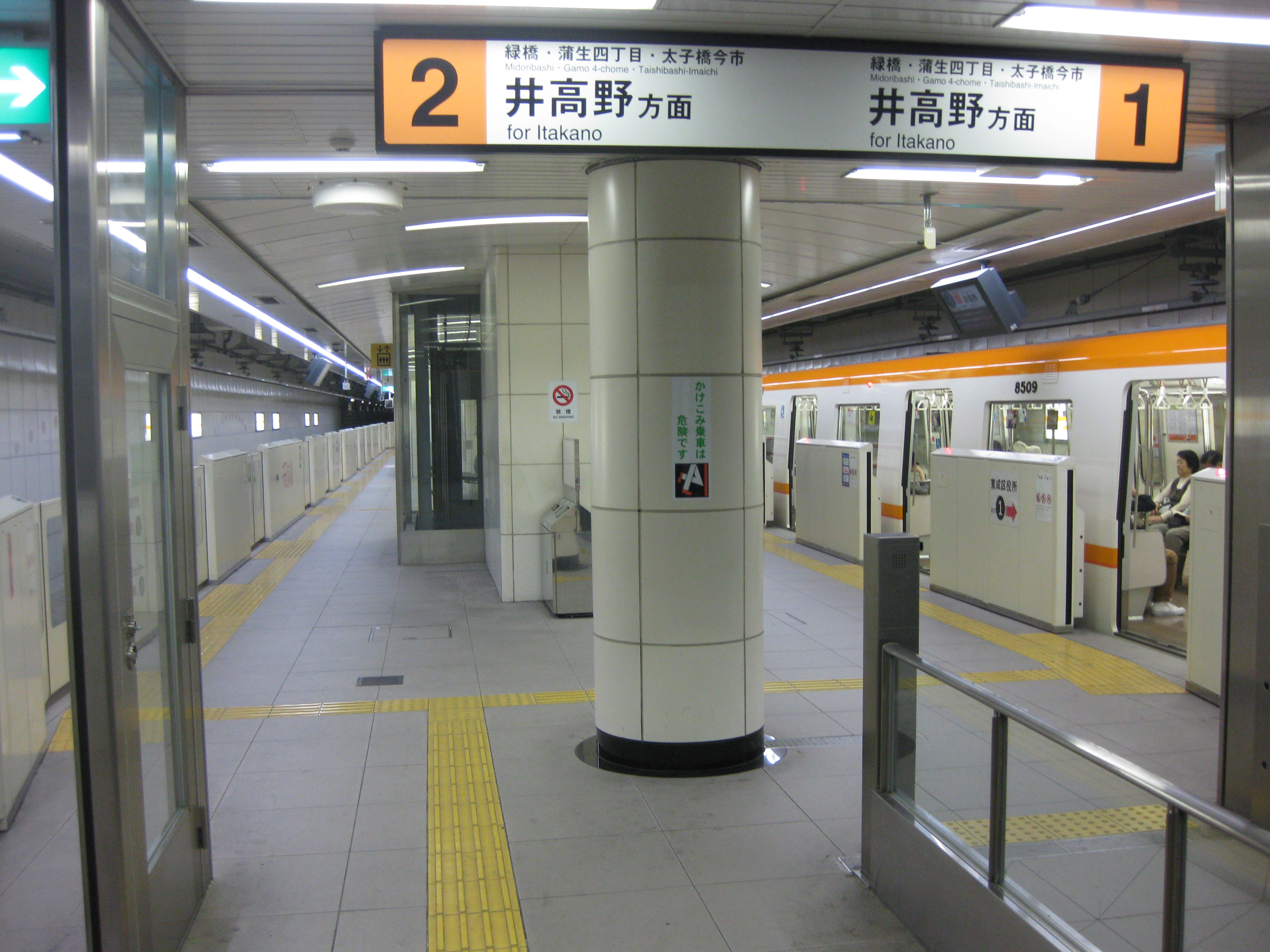 地下鉄今里筋線今里駅プラットホーム